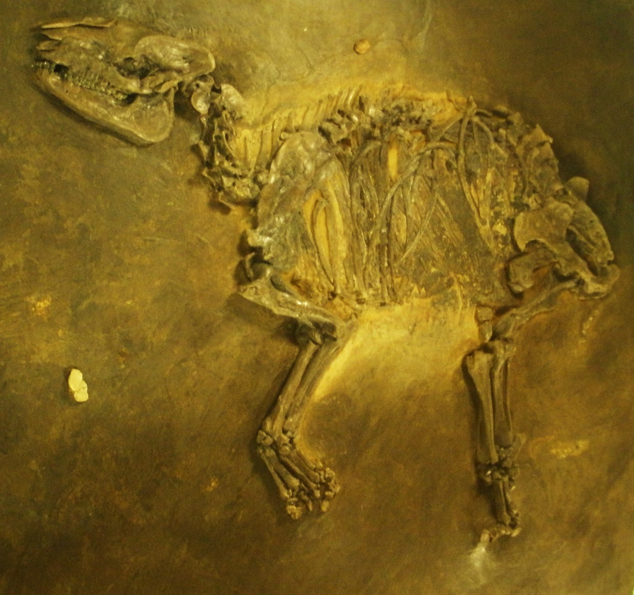 Fossil of Hyrachyus, an extinct mammal- Took the photo at Senckenberg Museum of Frankfurt